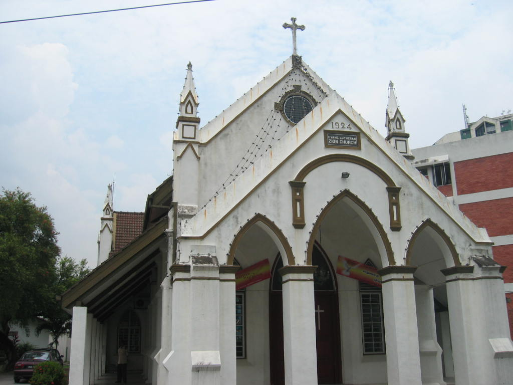 Self taken.